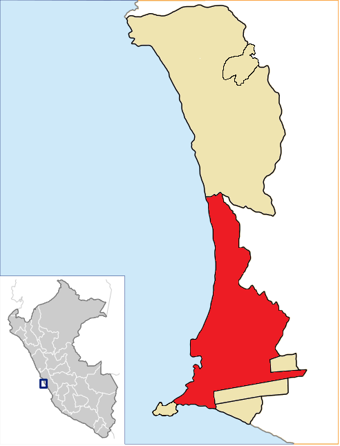 Callao Cercado